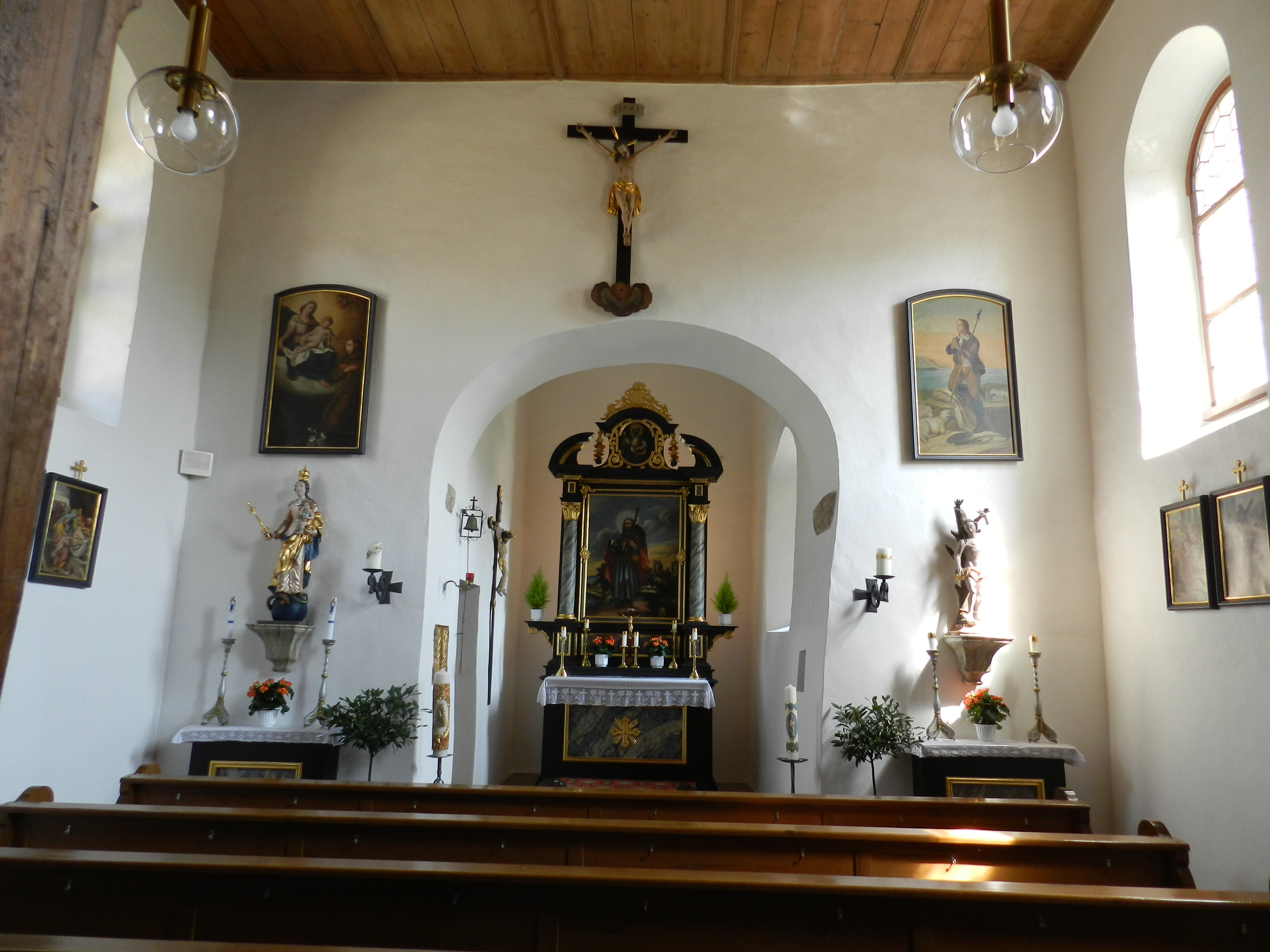 Willhof, Kirche St. Jakob, Innenansicht; Gemeinde Altendorf, Landkreis Schwandorf, Oberpfalz, Bayern (2011)